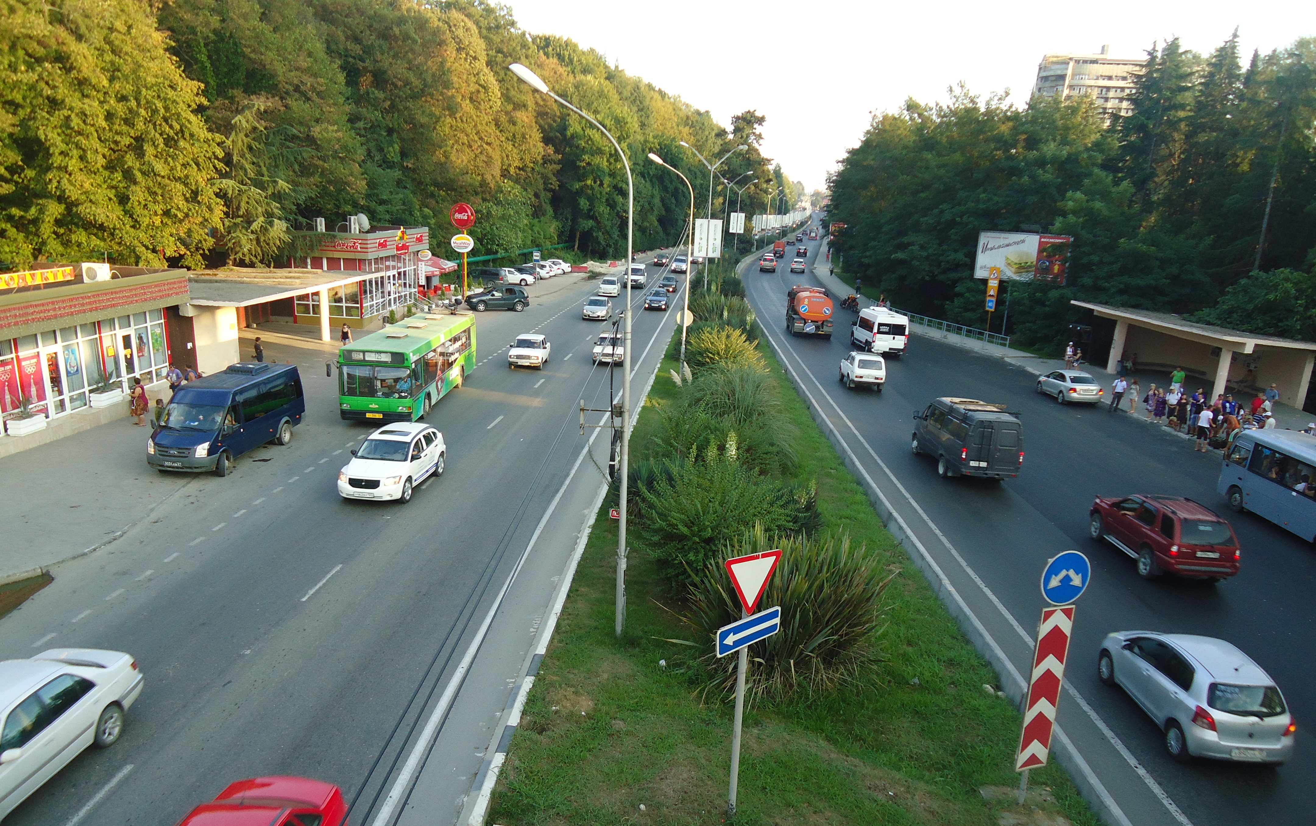 Улица Ленина в Адлерском районе города Сочи